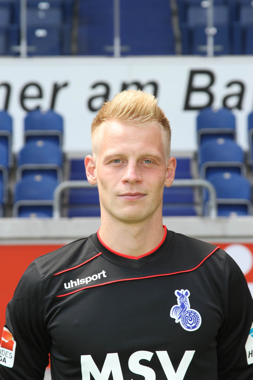 Marcel Lenz 2015